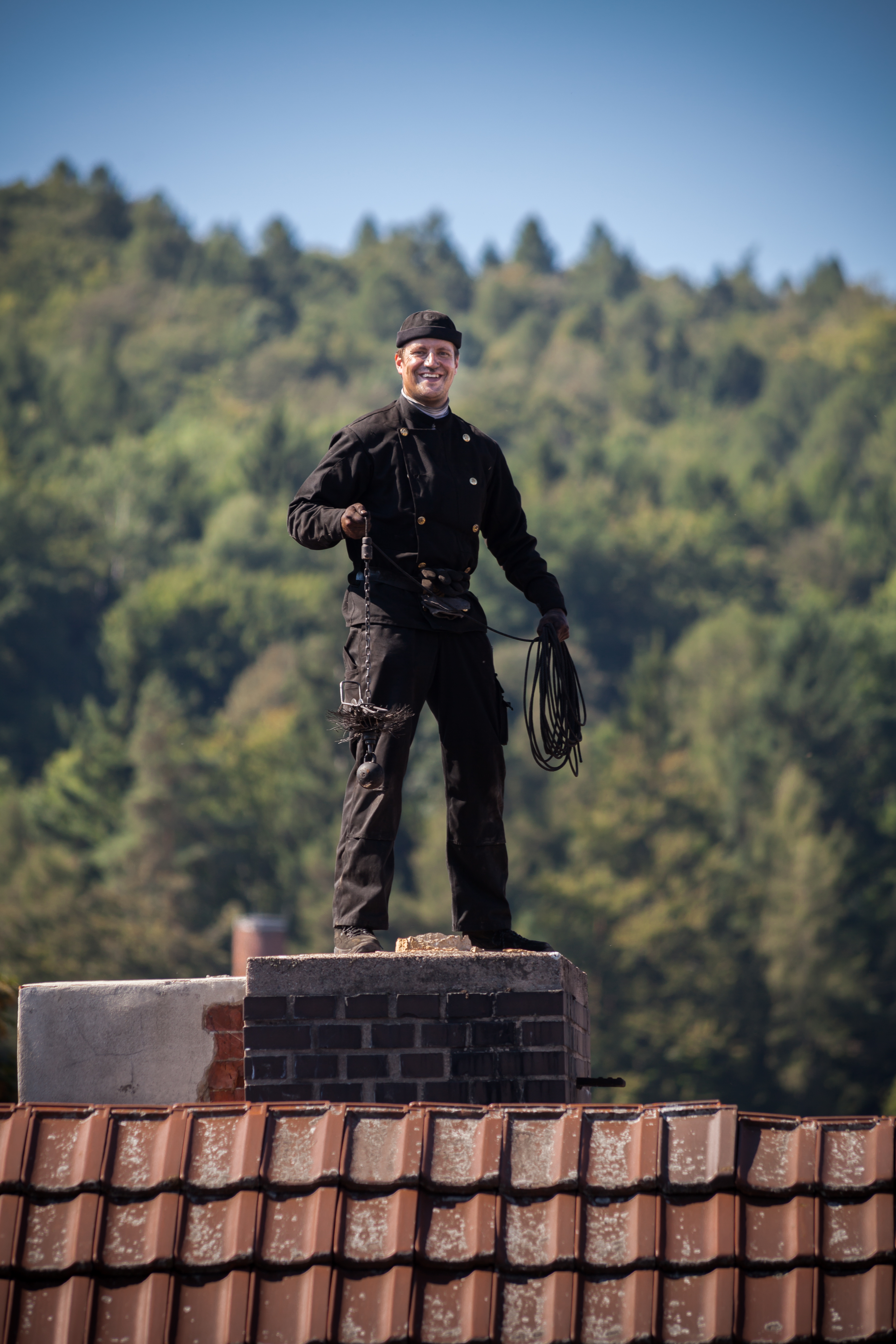 Schornsteinfeger auf einem Dach in Wanfried, Hessen, Deutschland.